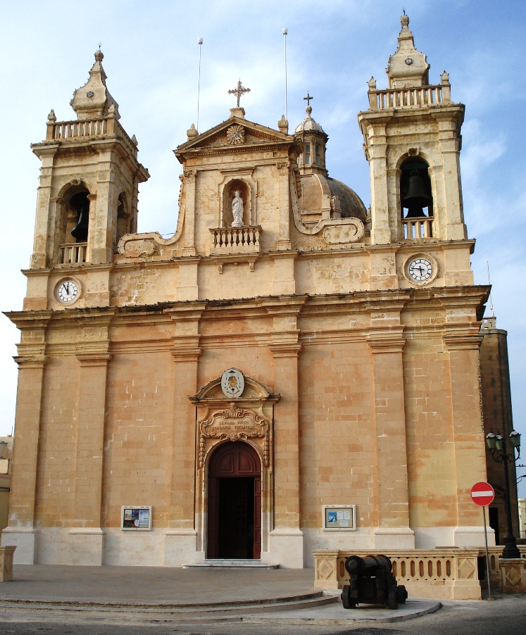 Die Kirche in Zebbug (auf Gozo / Malta)